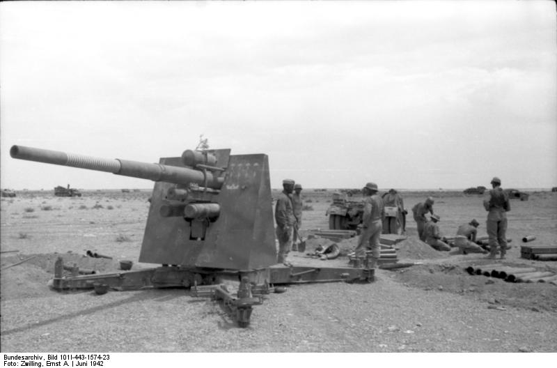 4.6.1942 Vor Bir Hacheim, einem engl. wichtigen Stützpunkt und Wasserstelle, 8,8 cm-Flak in Feuerstellung zur Niederhaltung der feindlichen Artillerie